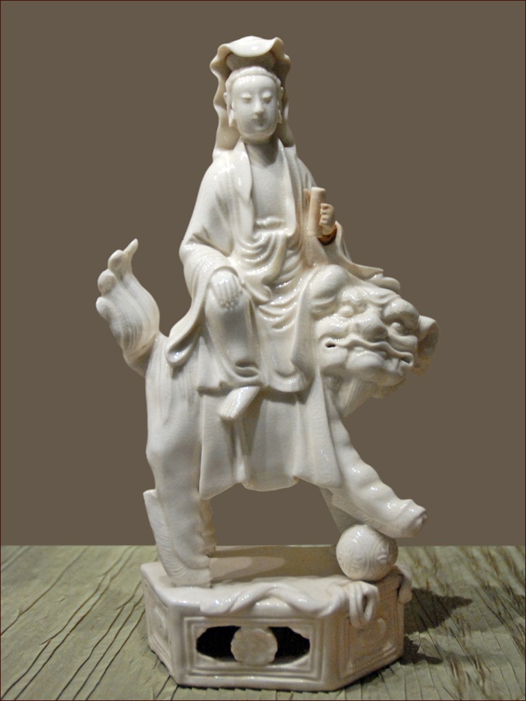 Guanyin assise sur un lion (Guan Yin en Chine, Quan Âm au Vietnam, Avalokiteshvara dans le monde indianisé, Kannon au Japon, Tara au Tibet,..) Divinité bouddhiste Porcelaine Chine, XVII-XIX sec. Musée d'art oriental Venise, Ca'Pesaro Guan Yin (Quan Am) est pour les chinois, la "Déesse de la Miséricorde" , c'est à l'origine le Bodhisattava de la compassion : Avalokiteshvara ou Avalokitesvara (Celui qui regarde vers le bas), le principal Bodhisattava du bouddhisme du Grand Véhicule. Il est représenté en Chine sous une forme féminine à partir du Xème siècle. Guan Yin est vénérée dans tout le monde asiatique notamment pour avoir un enfant ou pour être protégé lors d'un voyage en mer. Les attributs et représentations de Guanyin sont très nombreux. La divinité peut être figurée debout ou assise, souvent en robe blanche, avec à la main, plusieurs attributs comme une branche de saule, un vase d'eau lustrale, un livre, un lotus, un rosaire,.. . Elle peut être assise en méditation et avec un enfant dans les bras. Elle peut avoir de nombreux bras symbolisant les secours qu'elle apporte. Elle est souvent entourée de dévots et de donateurs. site officiel du musée Article de Wikipedia sur Guan Yin